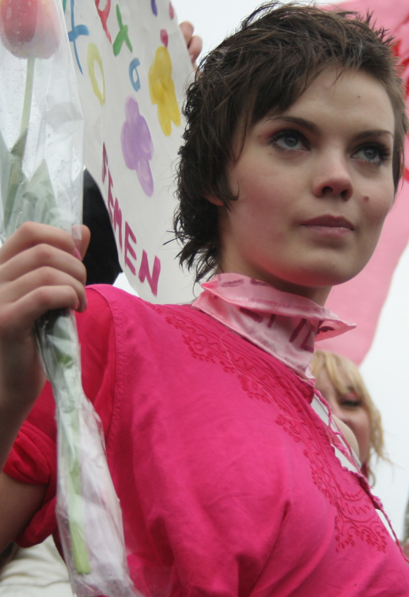 Oksana Shachko